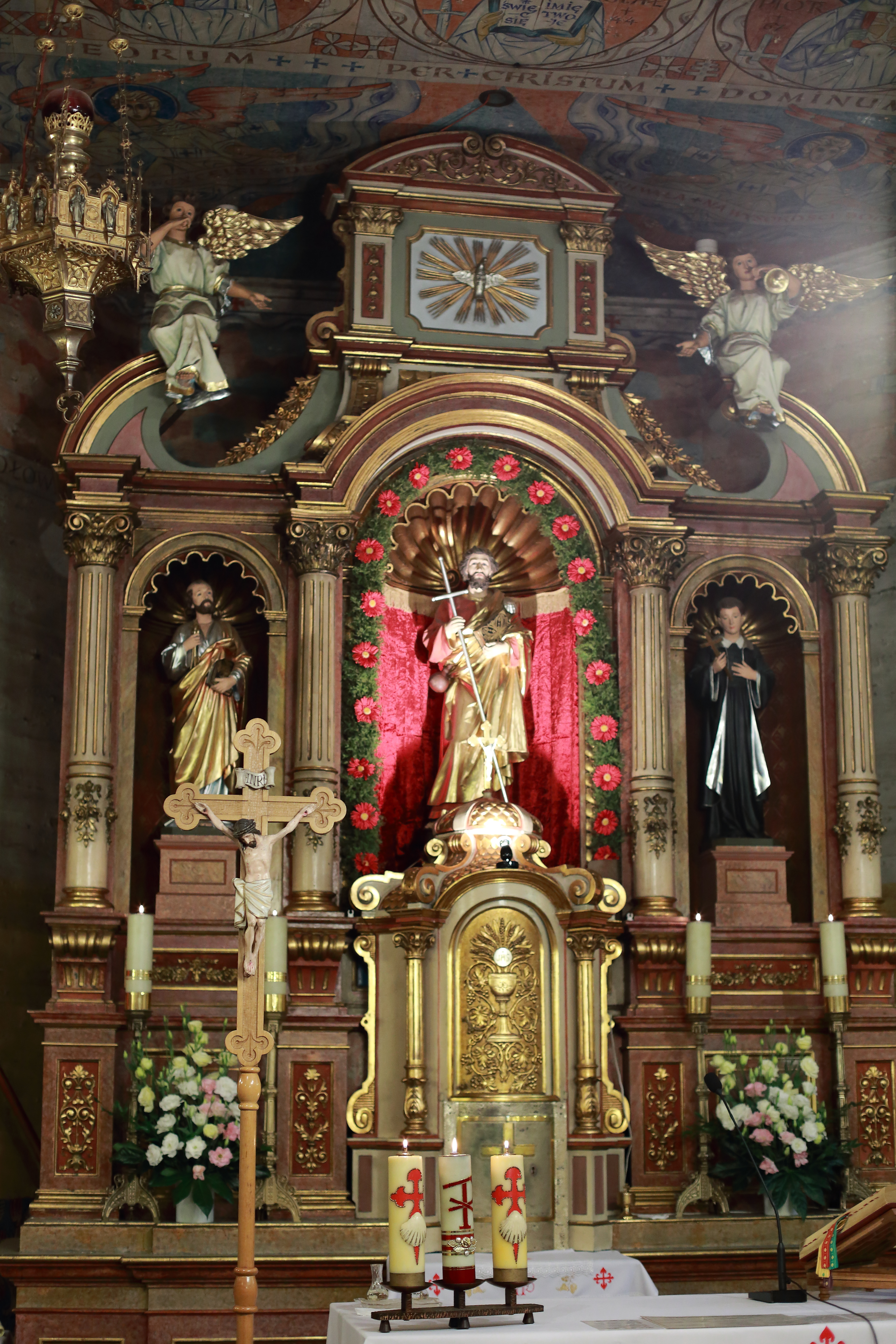 Szczyrk, kościół par. pw. św. Jakuba Starszego, 1797-1800, 1937-1939